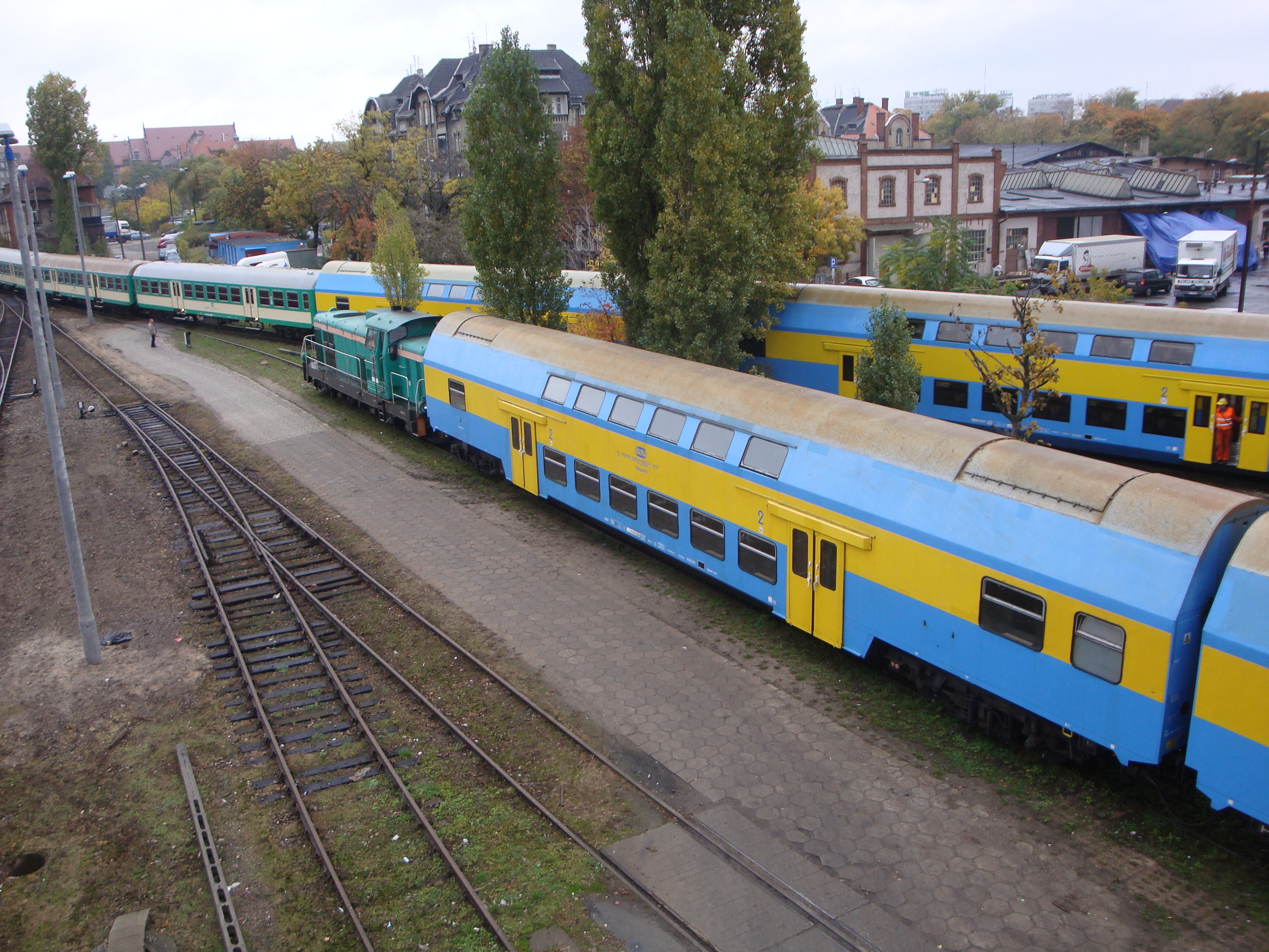 Wagon piętrowy Bmnopux Poznań Główny.